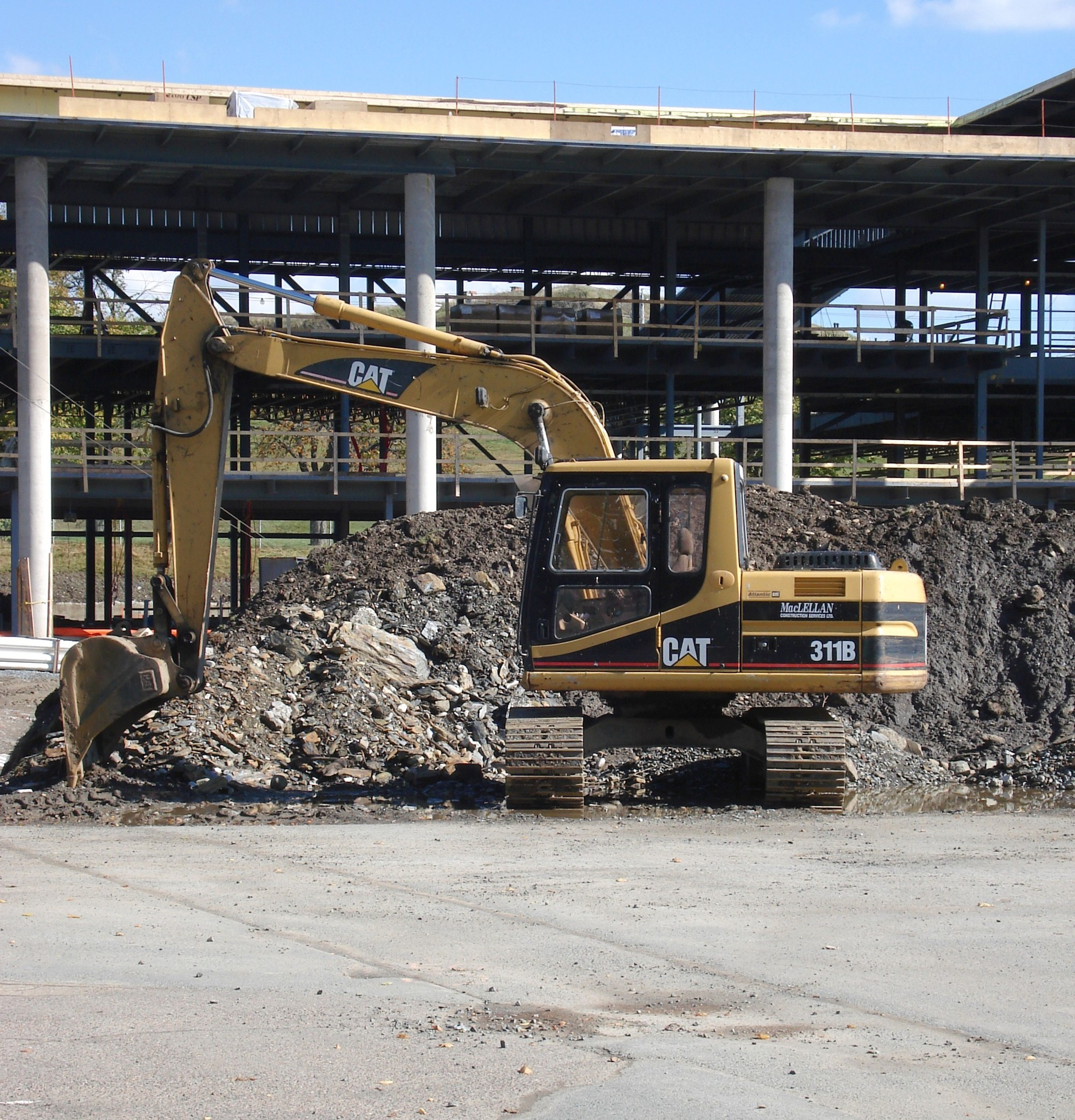 Caterpillar 311B excavator.